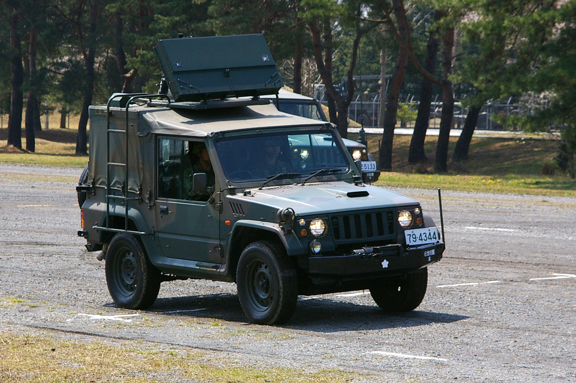 Taken by los688,8-Apr-2007,JGSDF Camp-Utsunomiya.JGSDF Type88 SSM.Search rader JTPS P-15.PD-self. ja:2007年4月8日、投稿者撮影。陸上自衛隊宇都宮駐屯地創立57周年記念行事。88式地対艦ミサイル、新73式小型トラックに搭載された捜索レーダーJTPS P-15、第6地対艦ミサイル連隊。